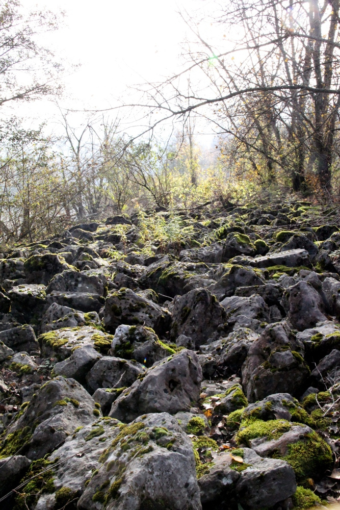 Reliquat de l'effondrement des falaises du Grand-Colombier qui a formé le terroir de l'AOC Seyssel